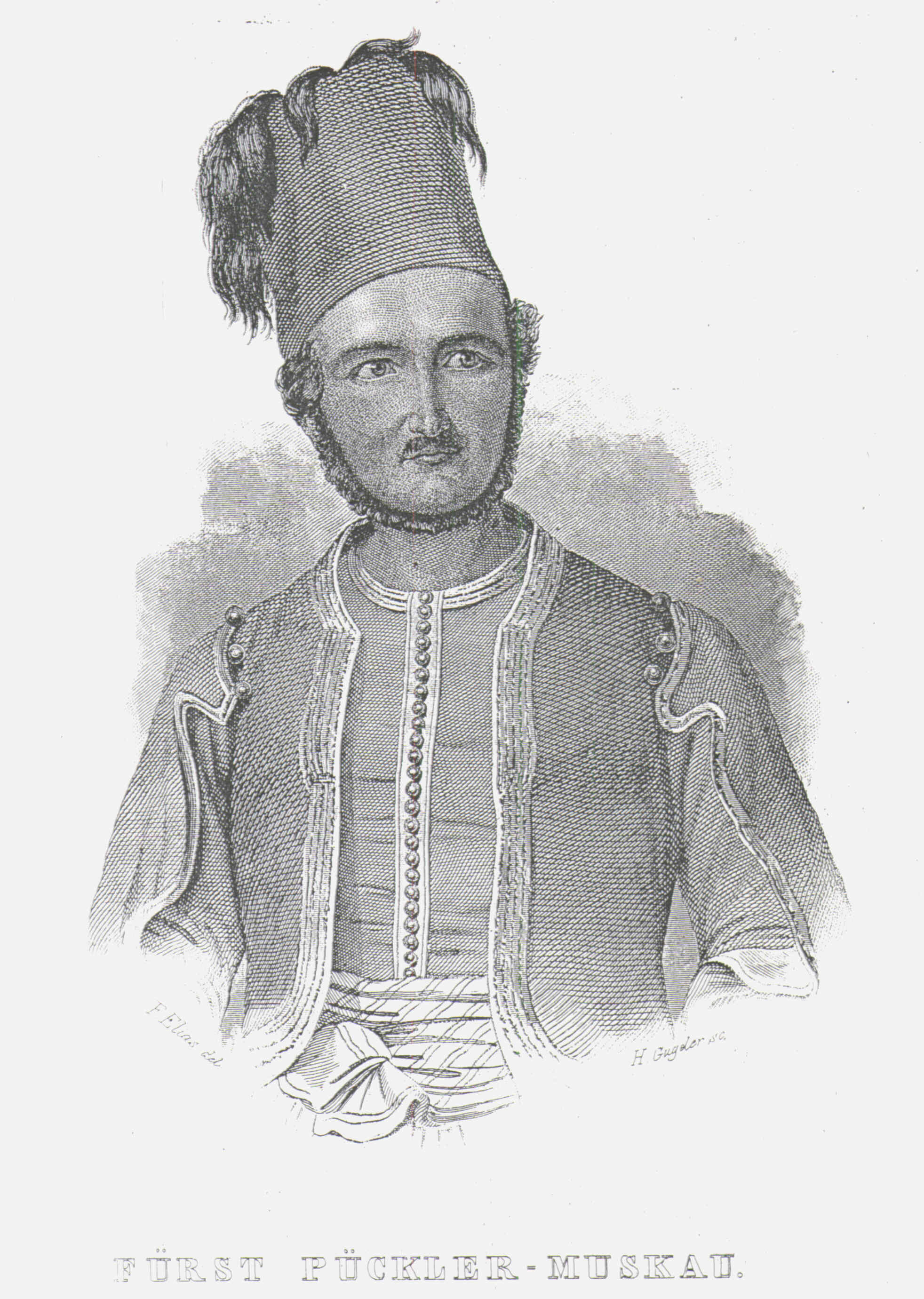 Fürst Pückler in moslemischer Tracht